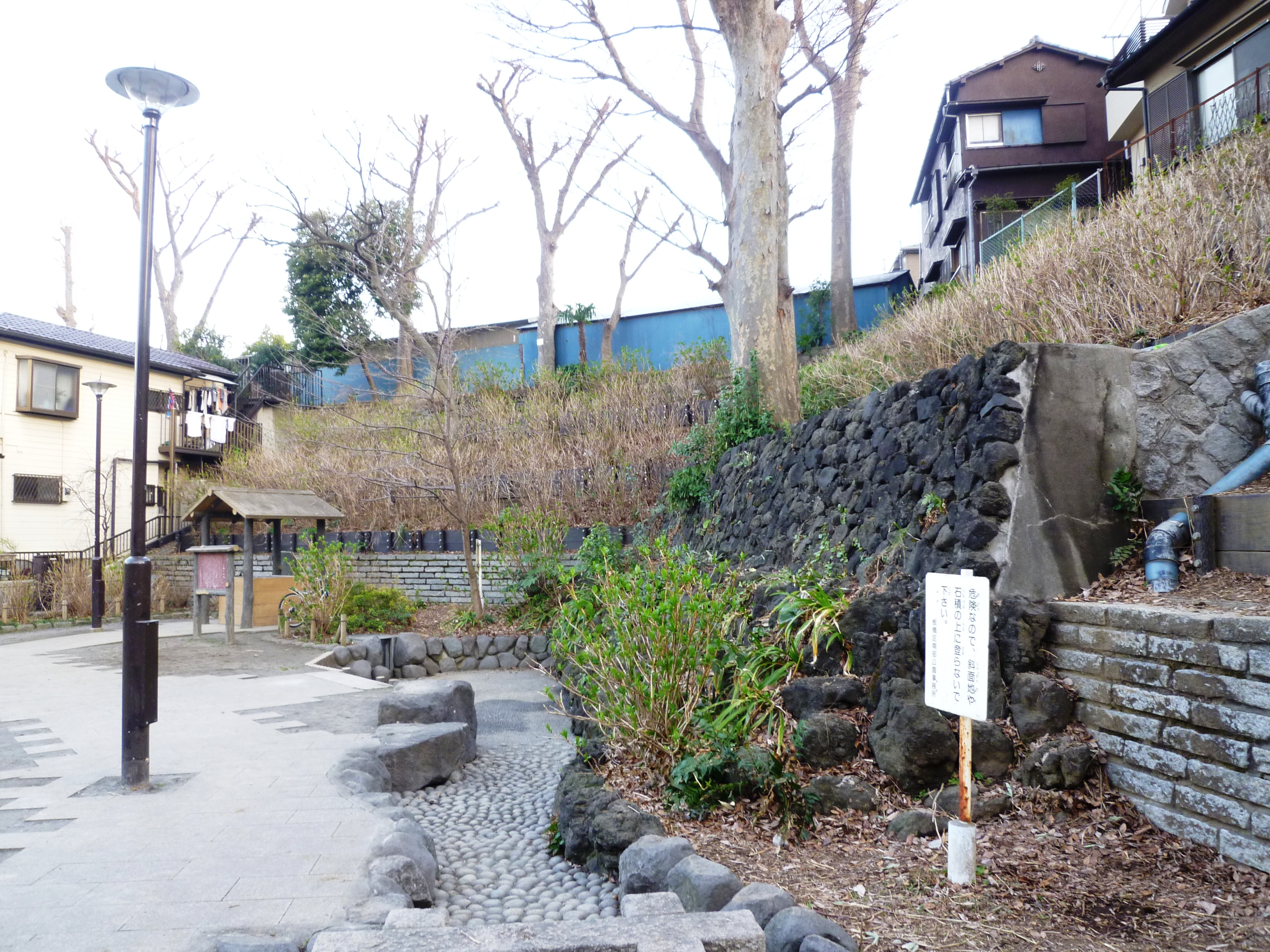 出井の泉公園